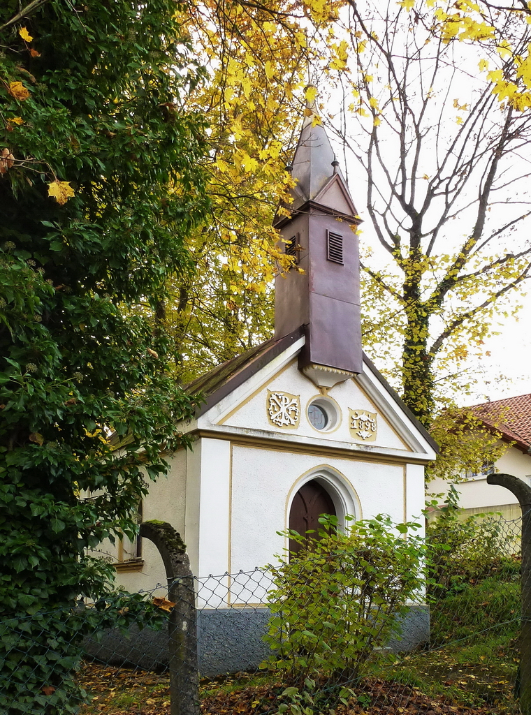 Errichtet 1898 lt InschriftThis is a photograph of an architectural monument.